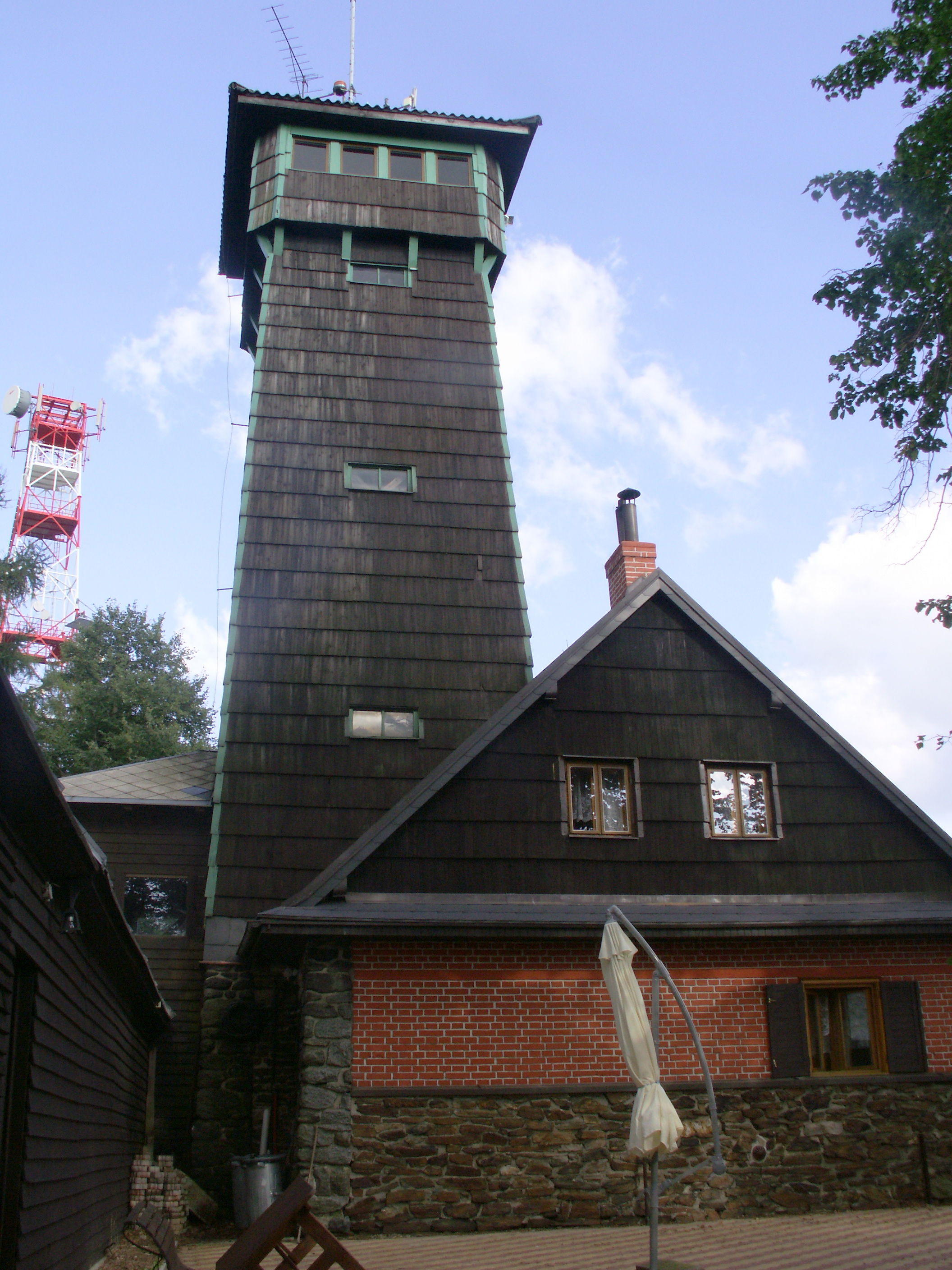 Rozhledna Lázek